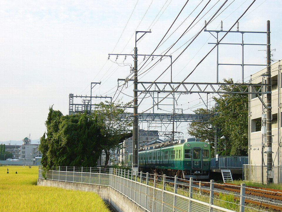 村野駅 駅南方からホームを望む 2006年9月29日 Bakkai撮影